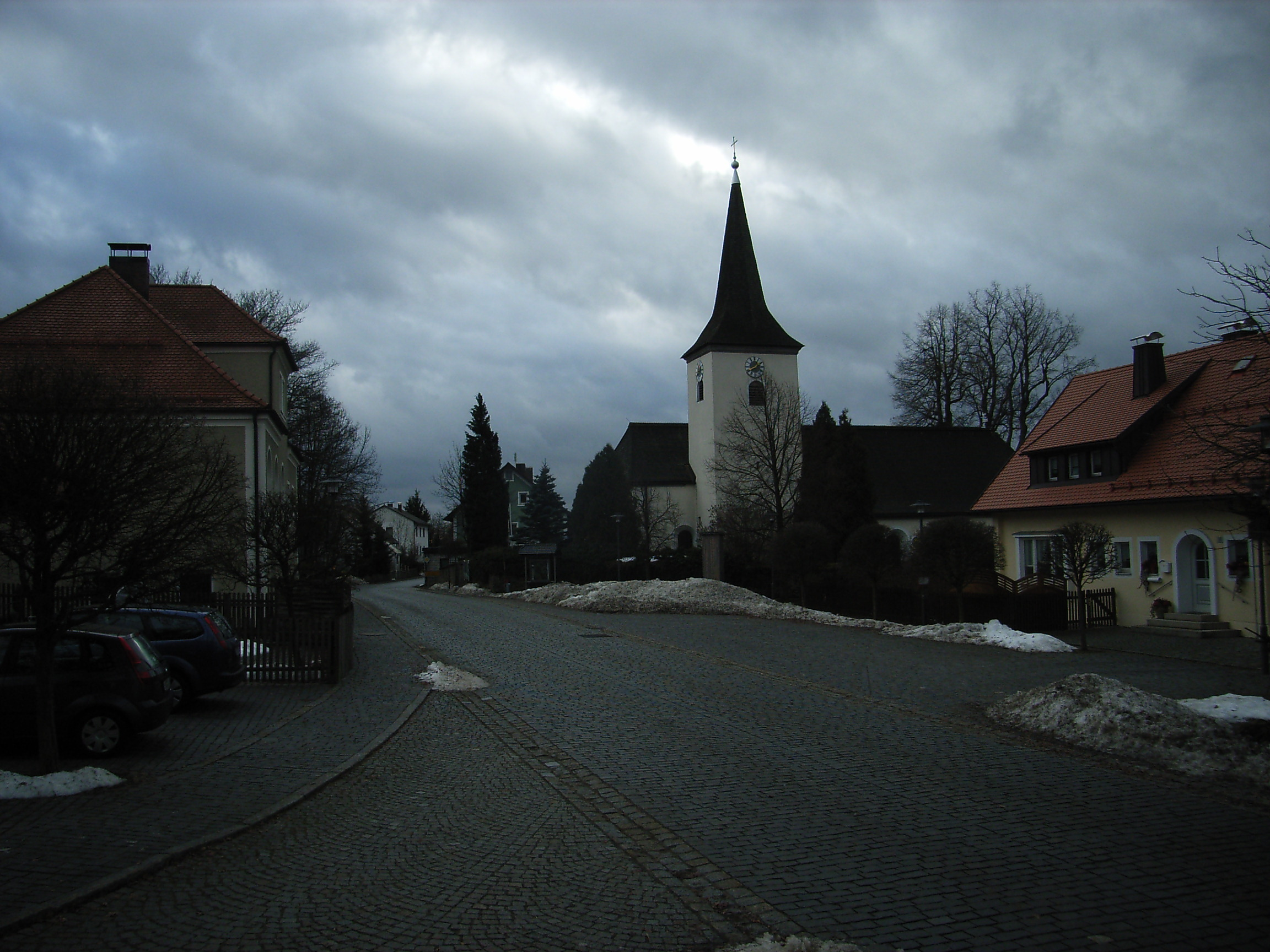 Stadlern